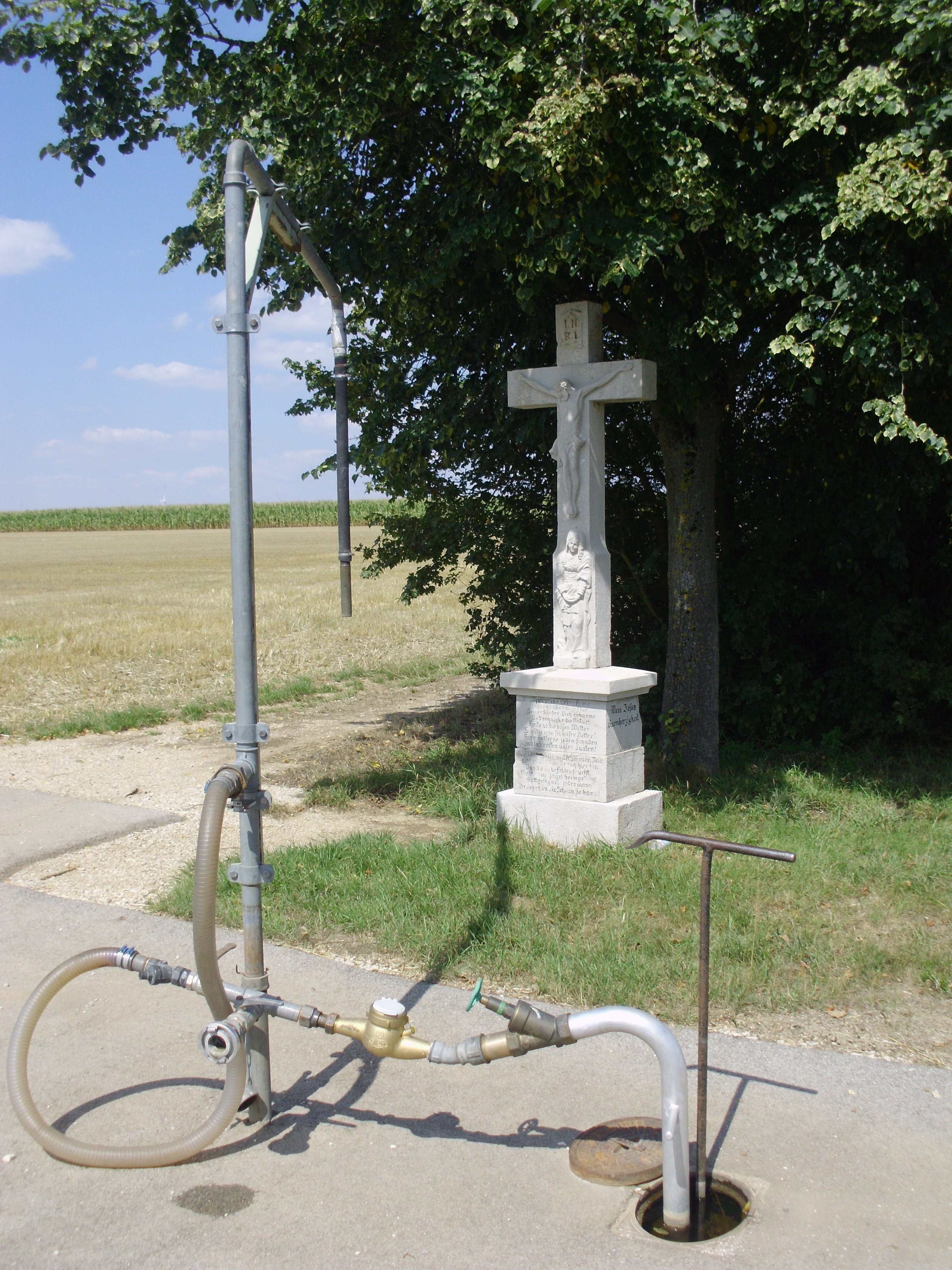 Euerwang, Ortsteil von Greding im mittelfränkischen Landkreis Roth in Bayern, Flurkreuz